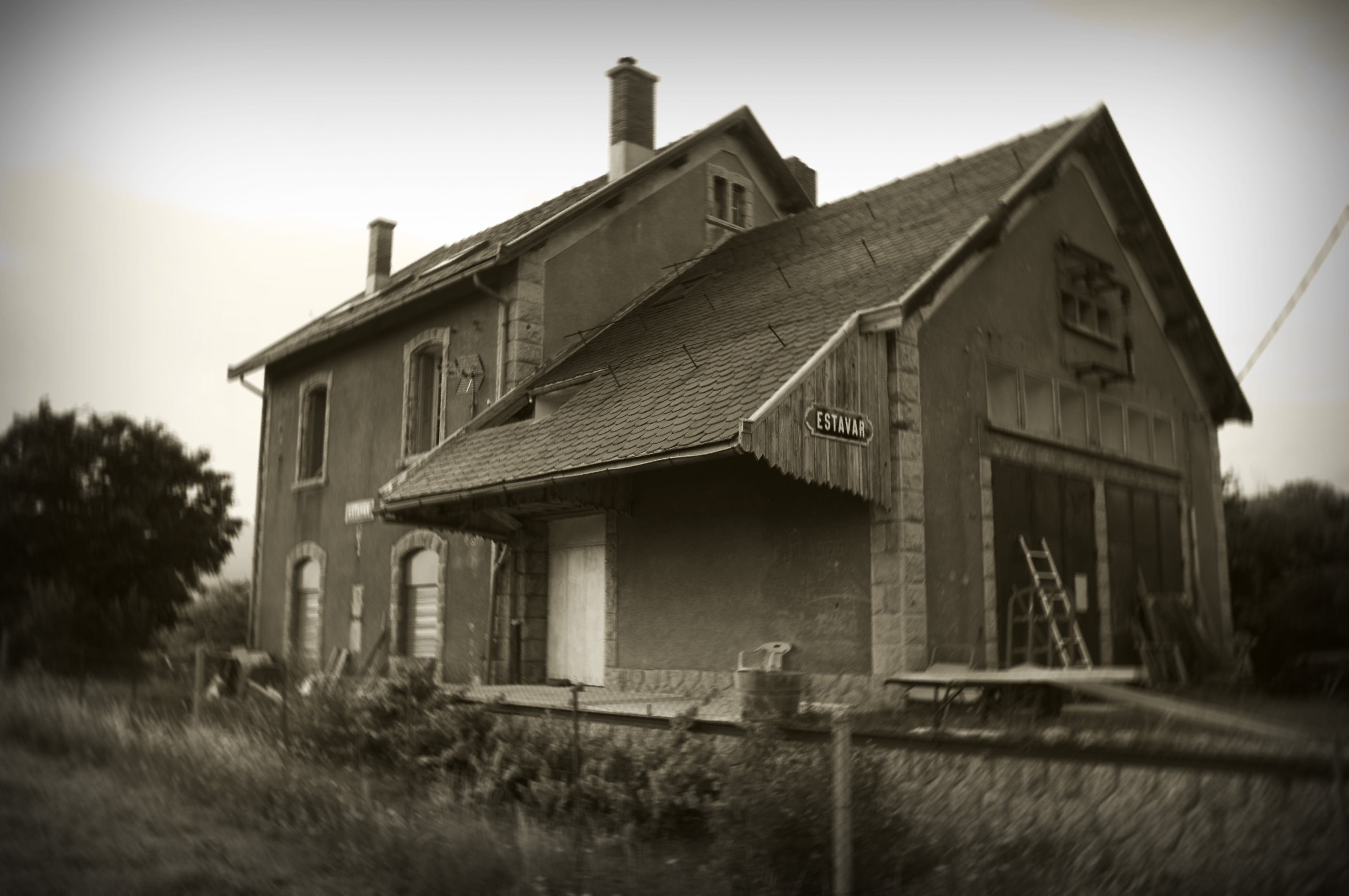 Gare d'Estavar